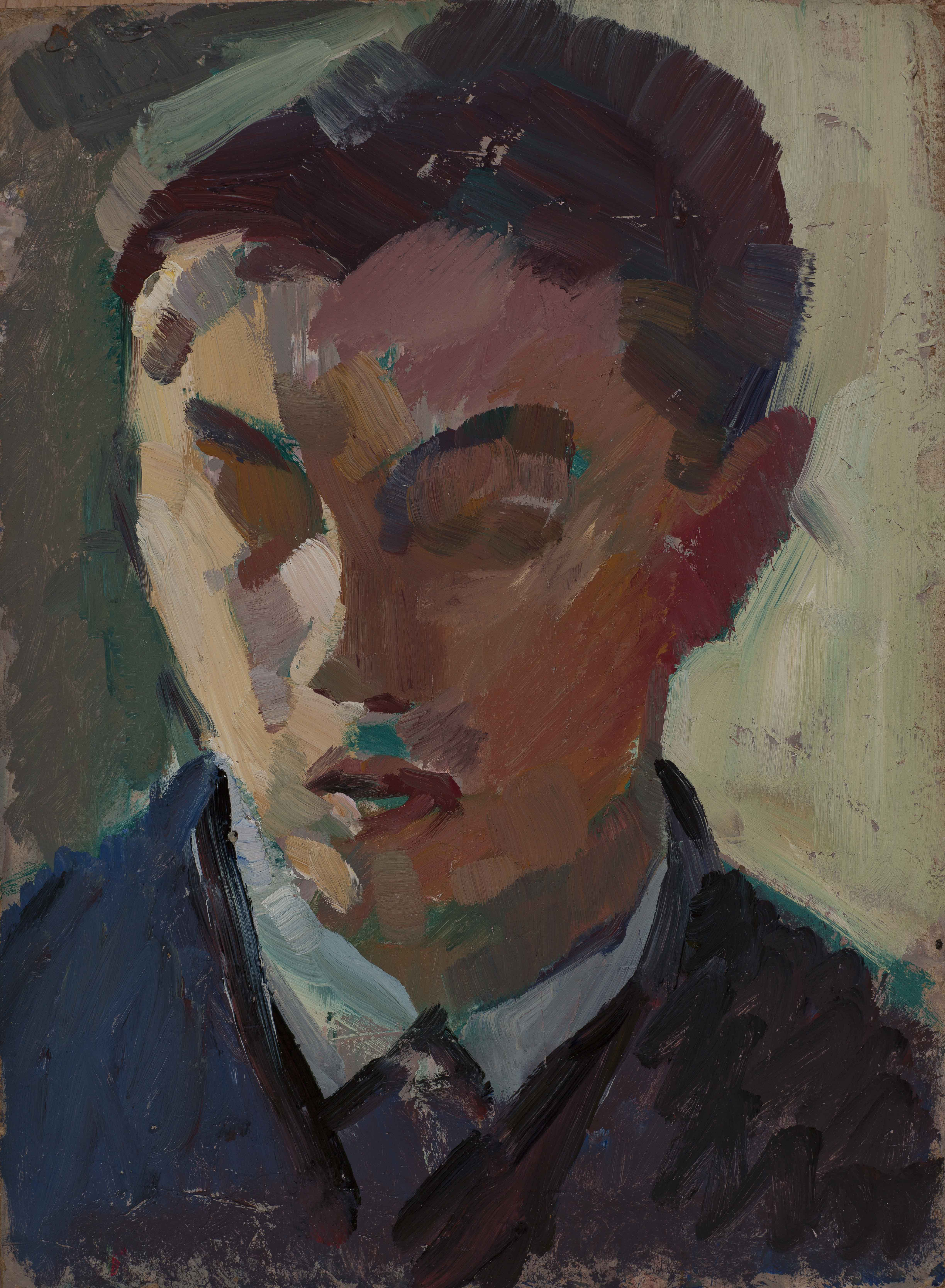 datiert 20.2.1930, 37x27,5 Öl auf Karton